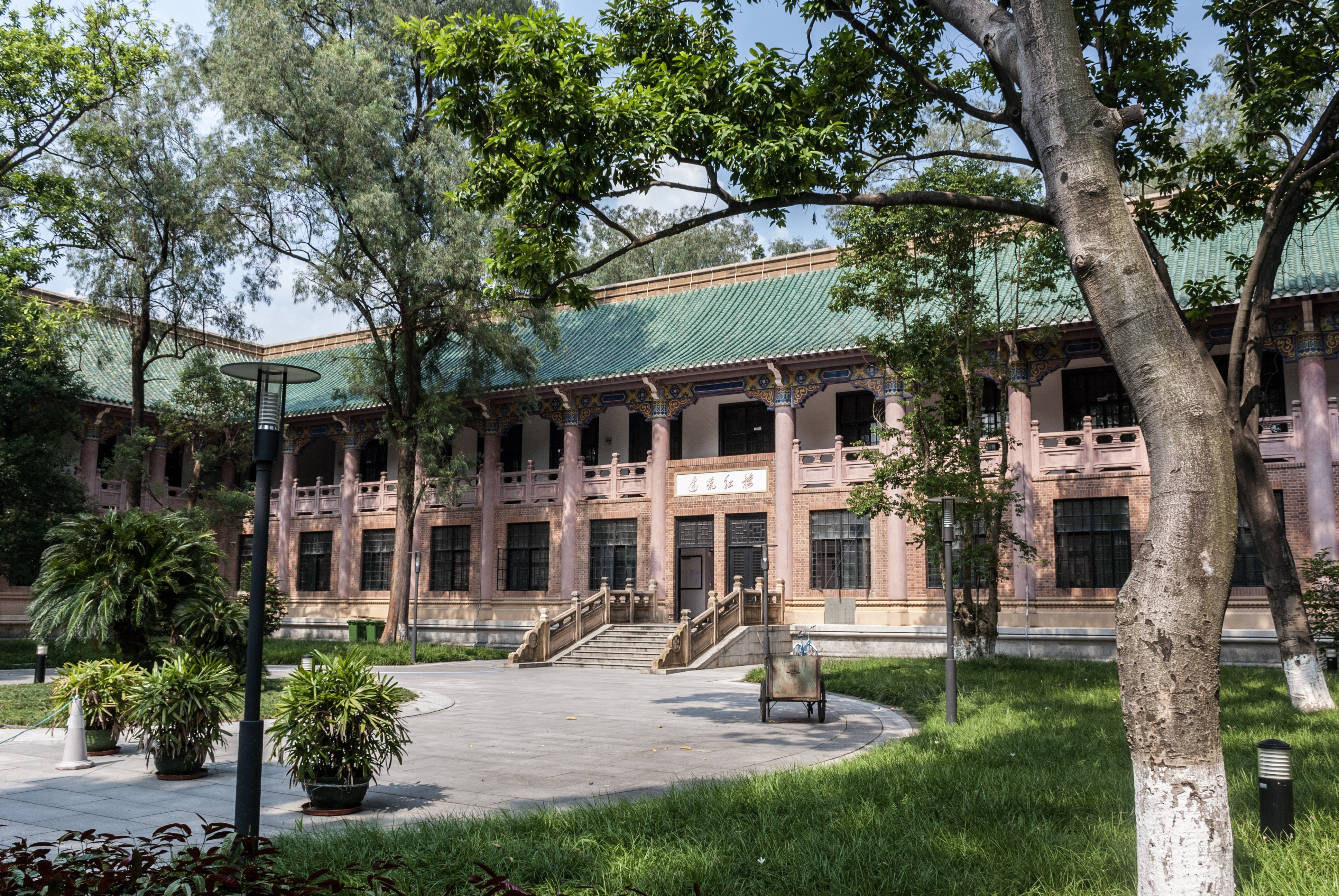 中文（中国大陆）: 中山大学石牌旧址建筑-理学院化学教室后立面，现华南理工大学6号楼（建筑红楼）